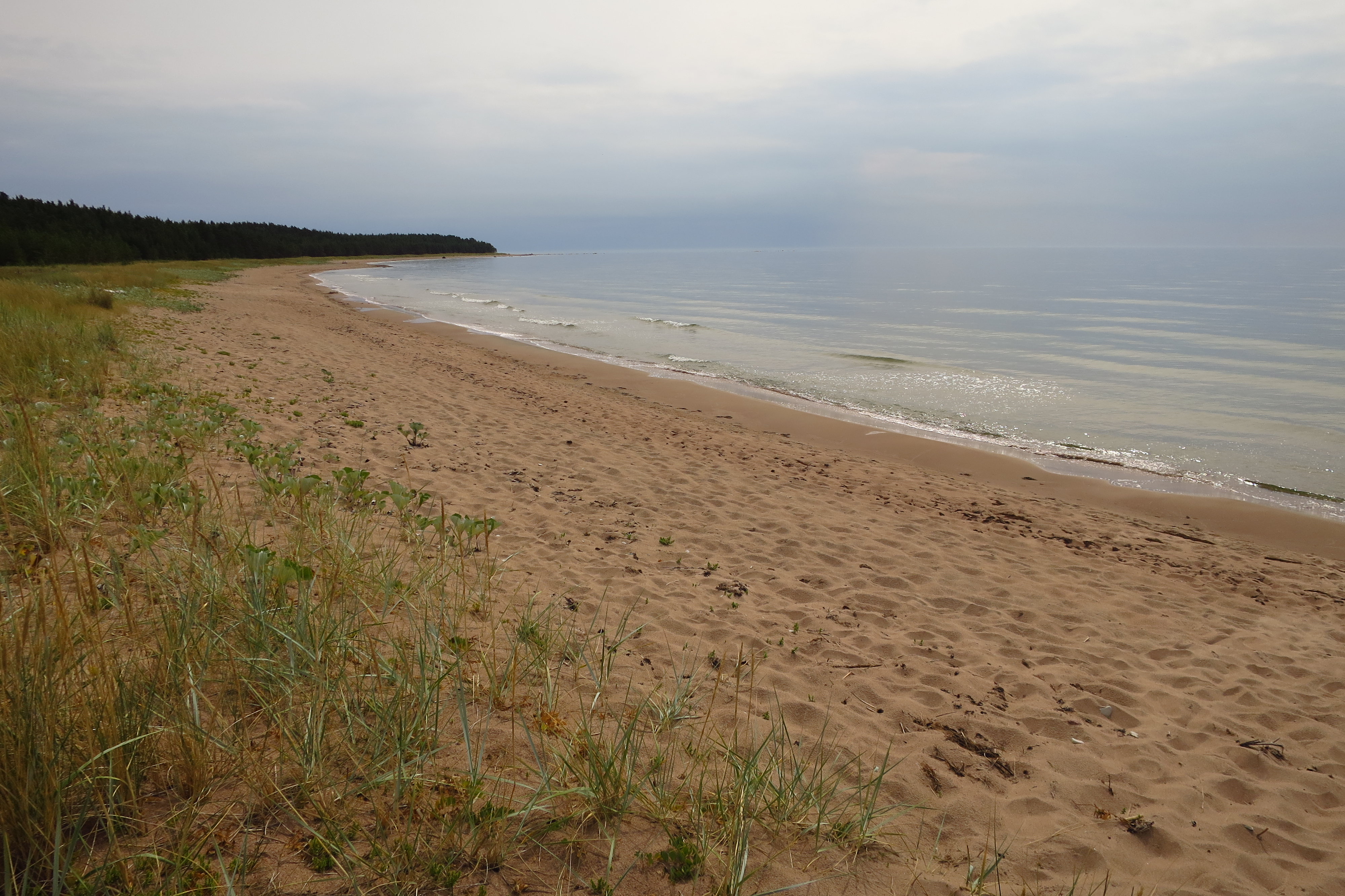 Kaleste laht Hiiumaal Kõpu looduskaitsealal